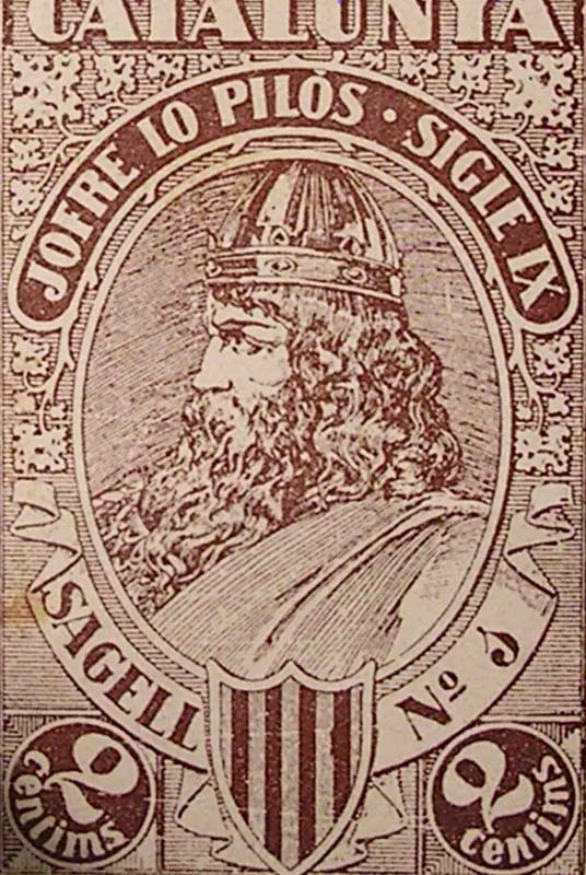 Segell catalanista de Guifré el Pilós